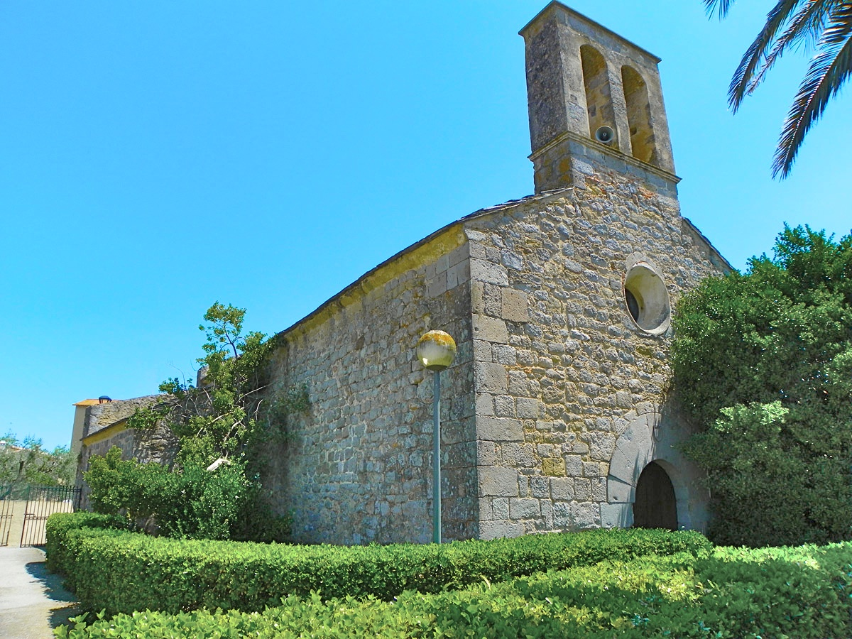 Sant Tomàs de Fluvià